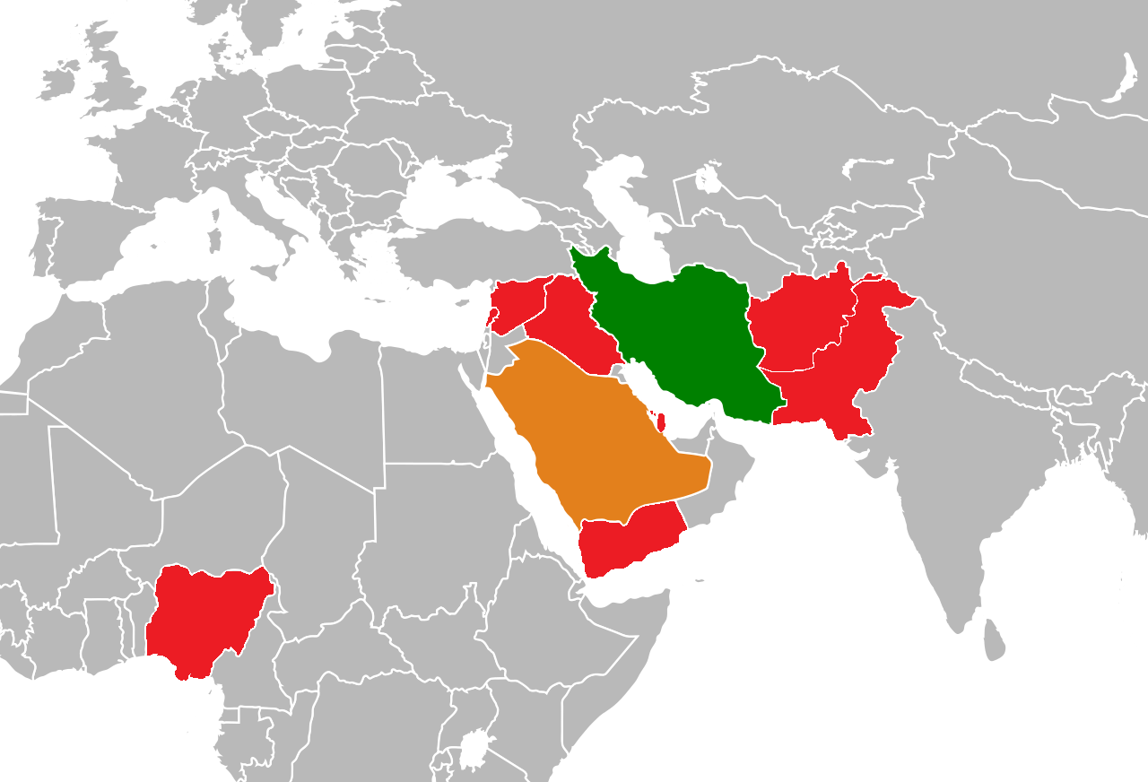 English (en): Iran–Saudi Arabia proxy conflict Iran Saudi Arabia Proxy war locations العربية (ar): صراع إيران والسعودية بالوكالة السعودية مناطق الصراع بالوكالة إيران